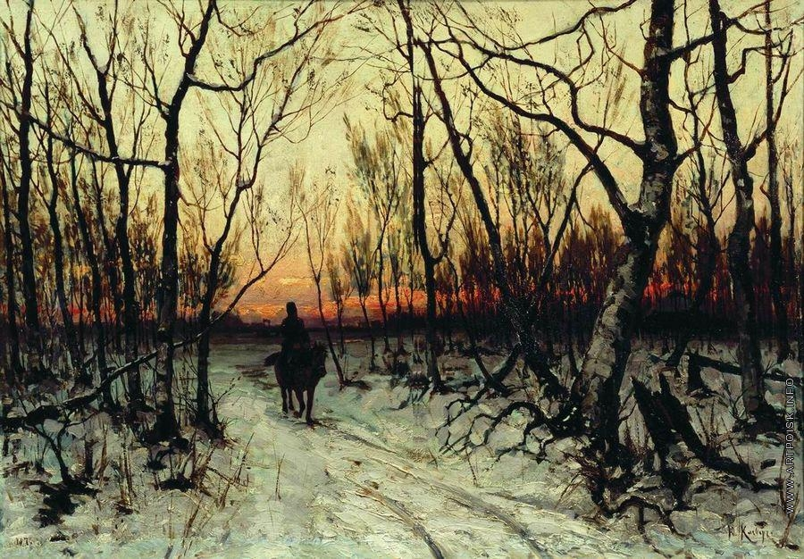 Ю. Ю. Клевер. К вечеру